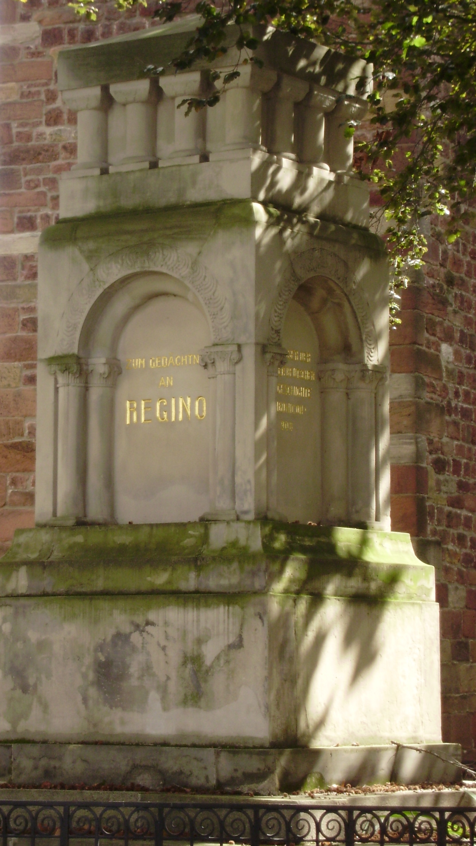 Reginodenkmal, 1911, Ludwigsstraße vor der Protestantischen Pfarrkirche